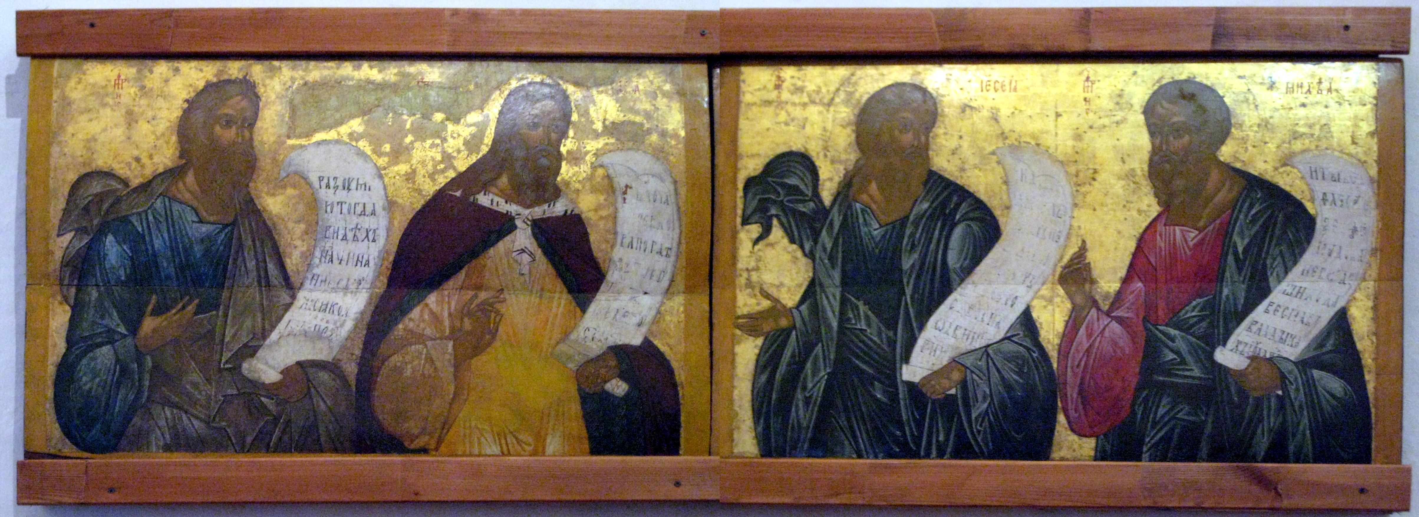 Пророки Илия, Варух, Иессей и Михей